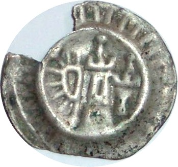 Blaffert Hohlblaffert, Hamburg, 15. Jahrhundert. ähnlich Gaedechens Nr. 1254.